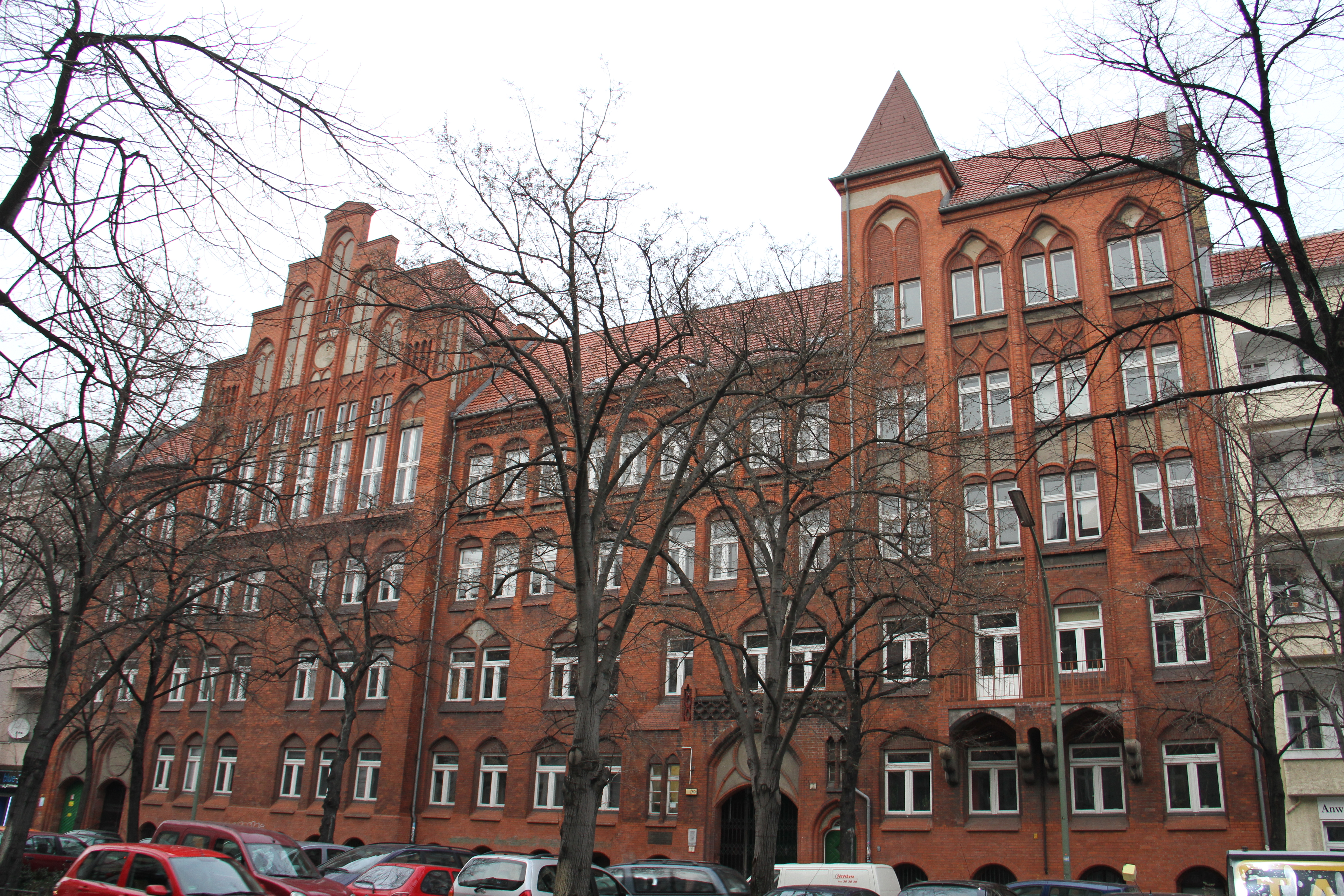 Schule, 1901–1902 von Weigand, 1906–1907 von Reinhold Kiehl Koordinate:52°29′0″N 13°26′13″E / 52.483333°N 13.43694°E